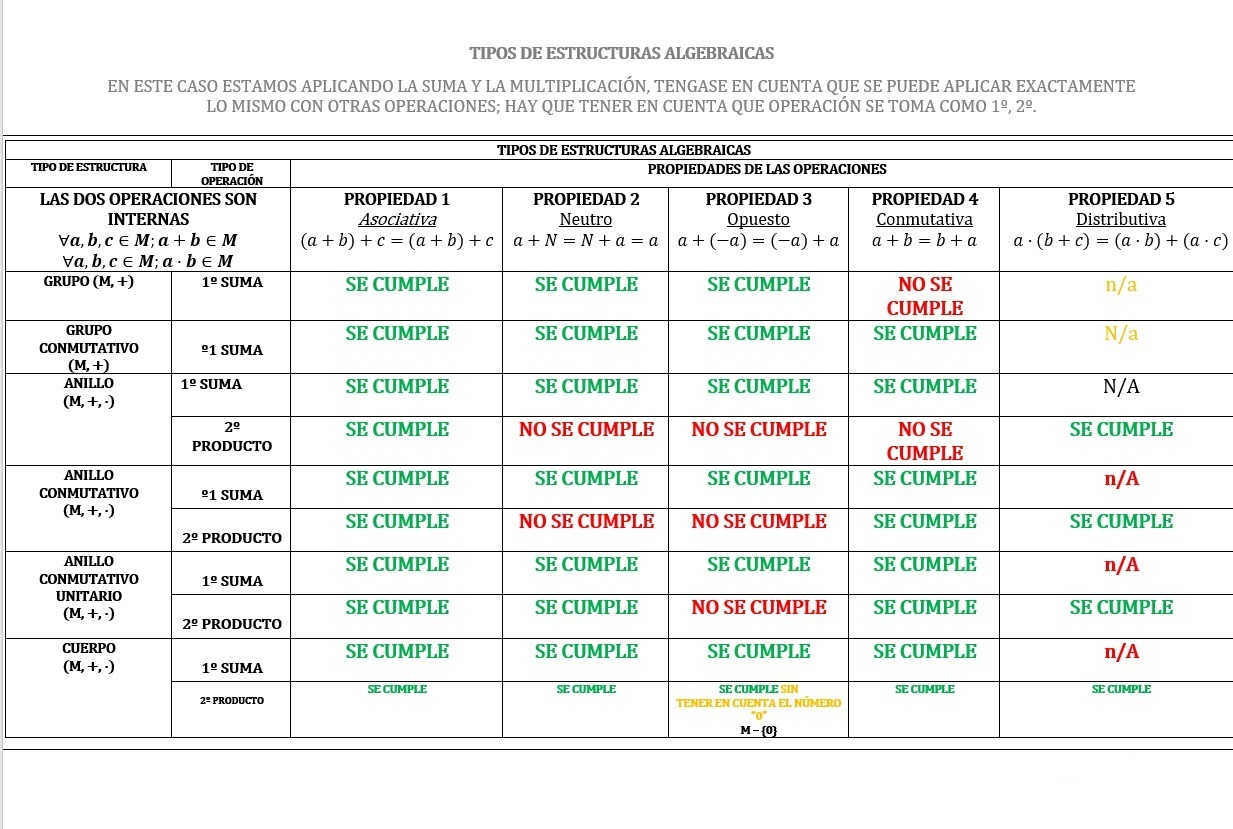 Aqui tenemos los tipos de estructuras algebraicas según el numero de operaciones y las propiedades de estas operaciones.